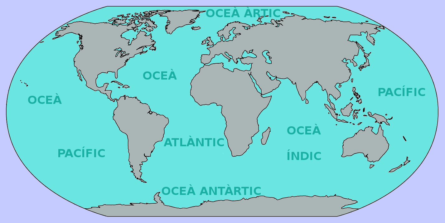 Oceans de la Terra